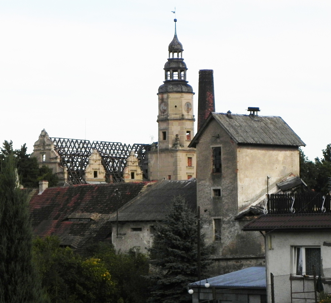 Gorzanów, ul. Podzamcze 12 - zespół zamkowy: oficyna-browar (zabytek nr rejestr. 215/1032/WŁ)